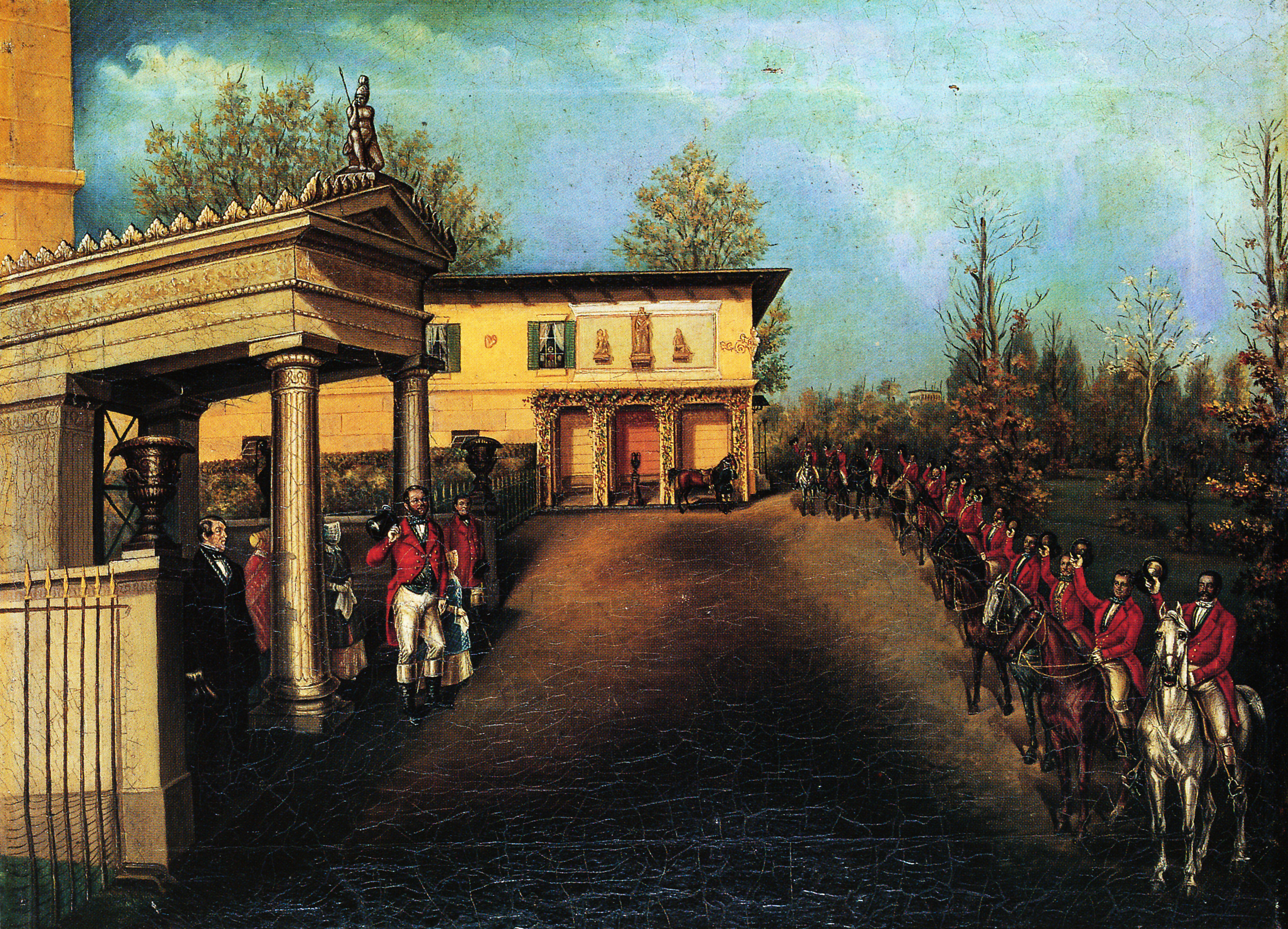 Park Klein-Glienicke, prinz Carl wird durch Rote Jäger begrüßt, unbekannter Künstler, 1847